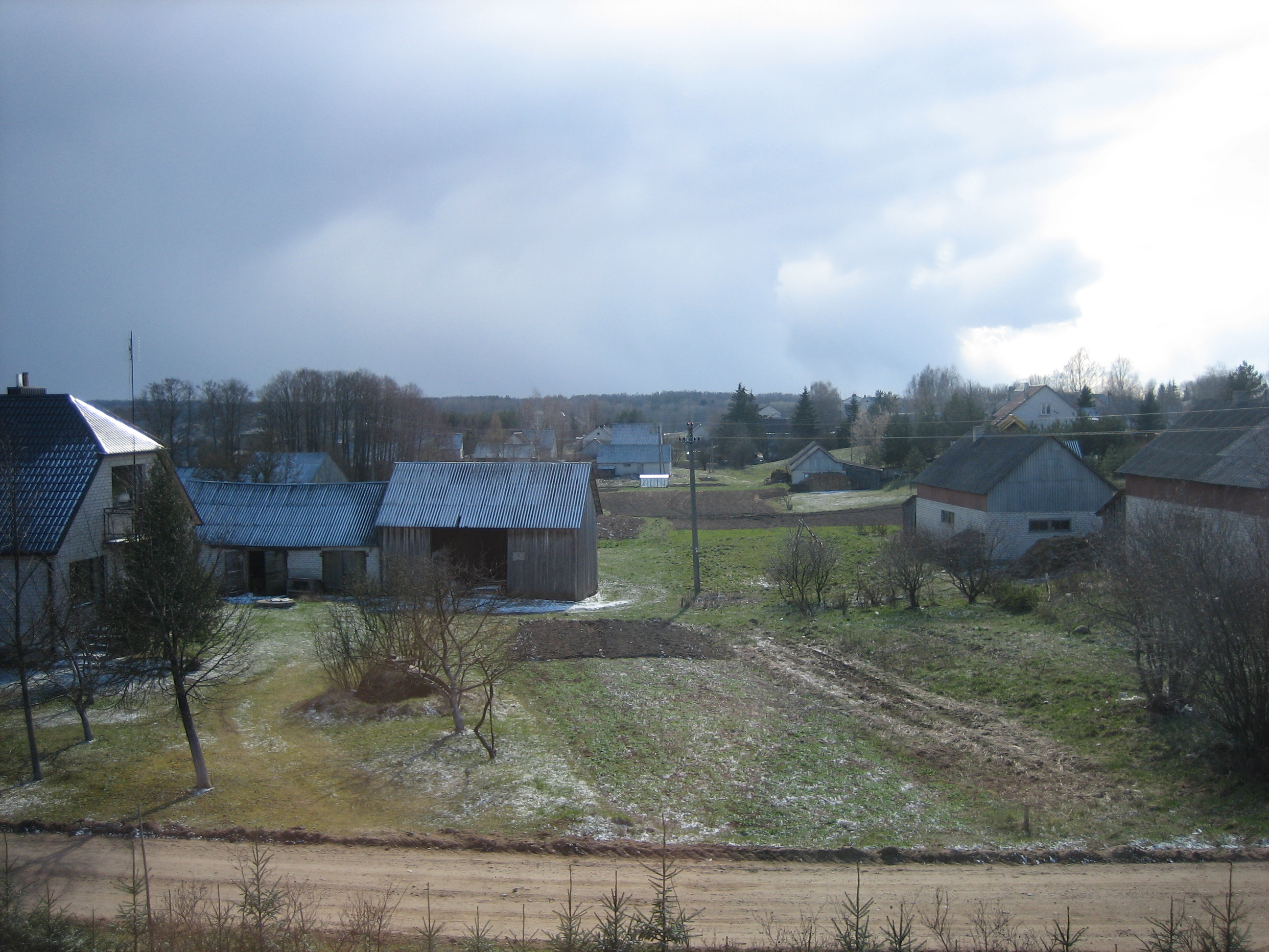 Verbiškių kaimas